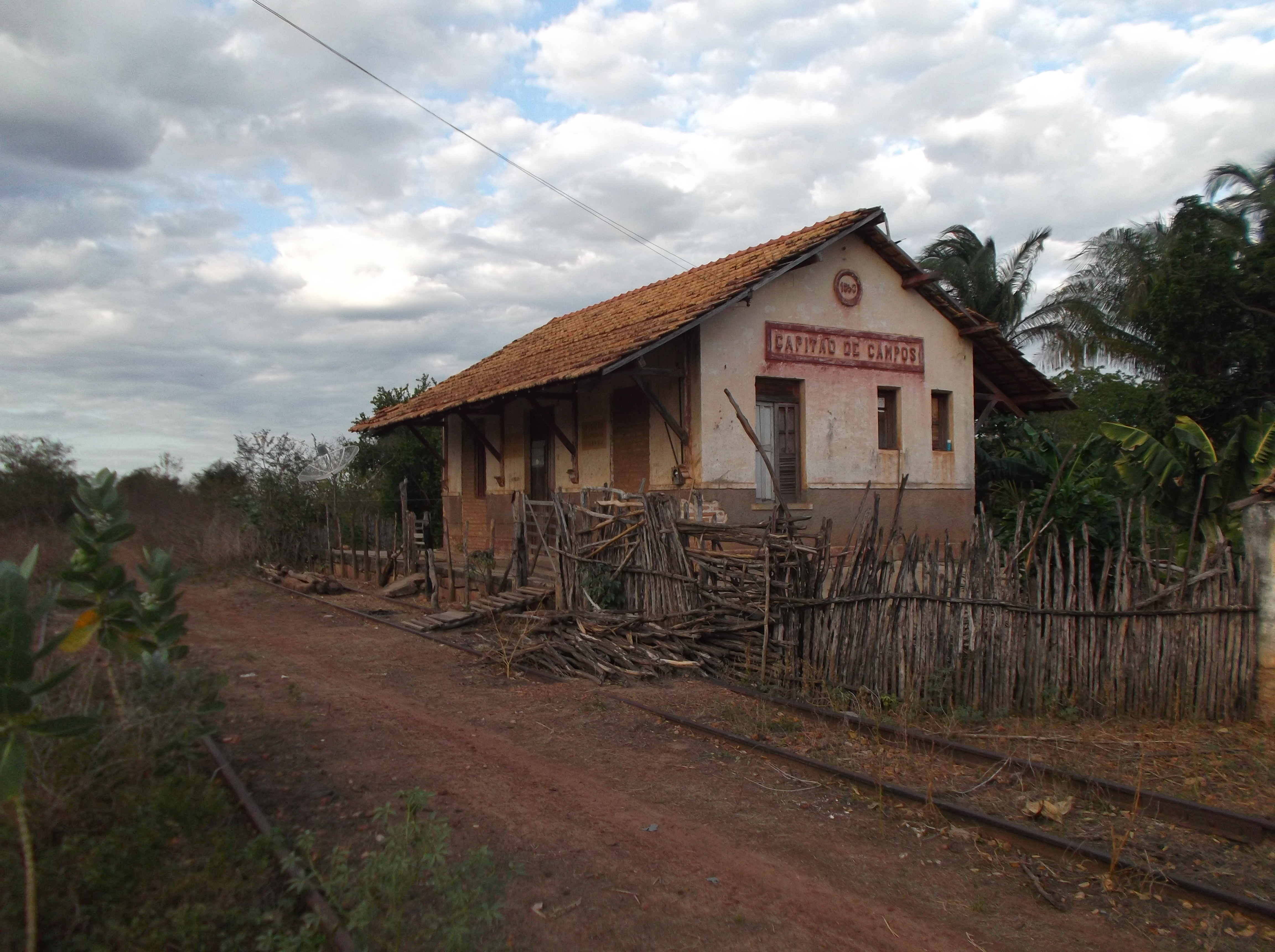 Estação ferroviária de Capitão de Campos, no Piauí